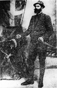 Илия Делиянакис